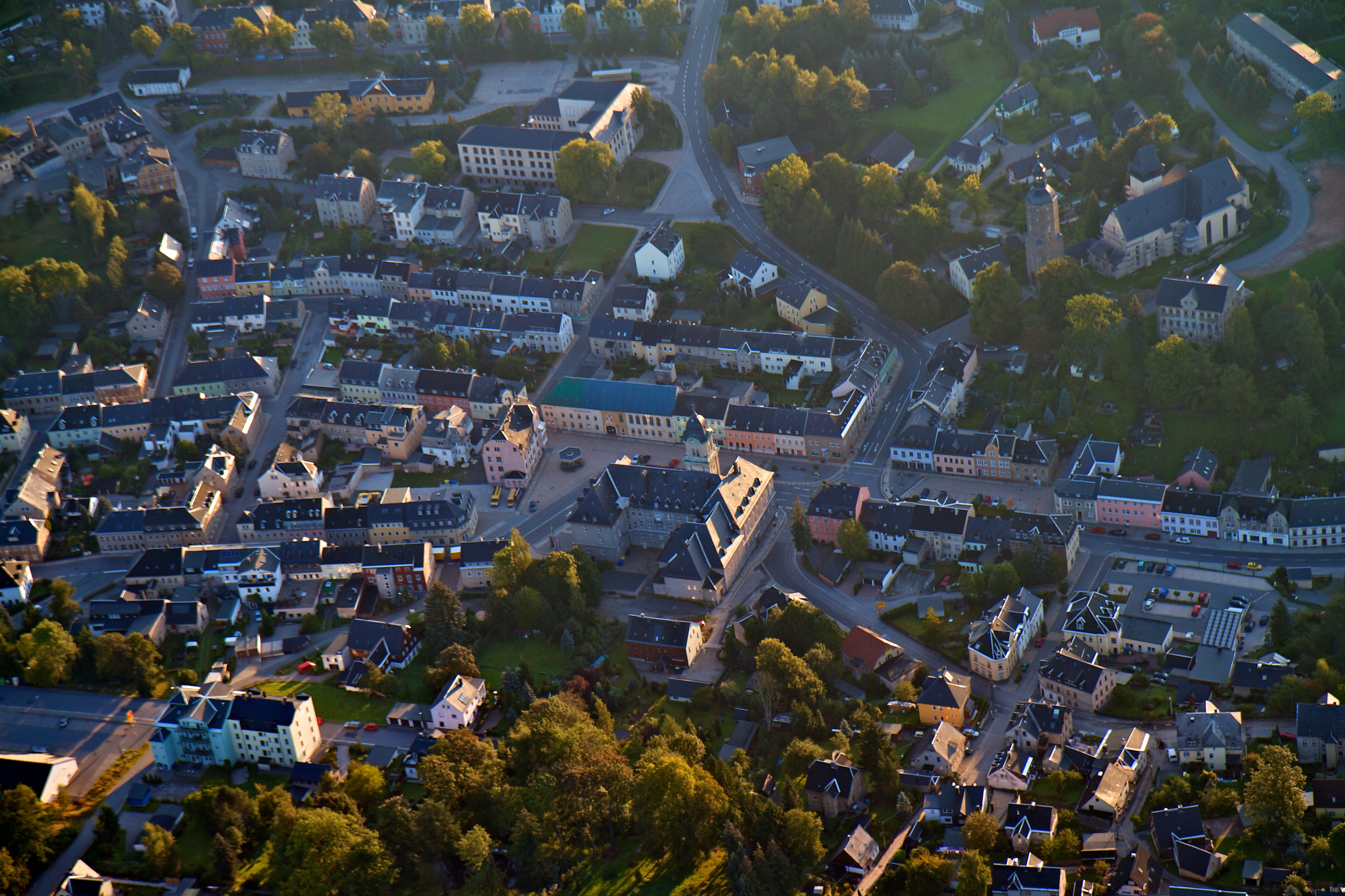 Das Luftbild der Berg- und Bingestadt Geyer im Erzgebirge ist bei einer Ballonfahrt am Morgen des 03.09.2011 entstanden.